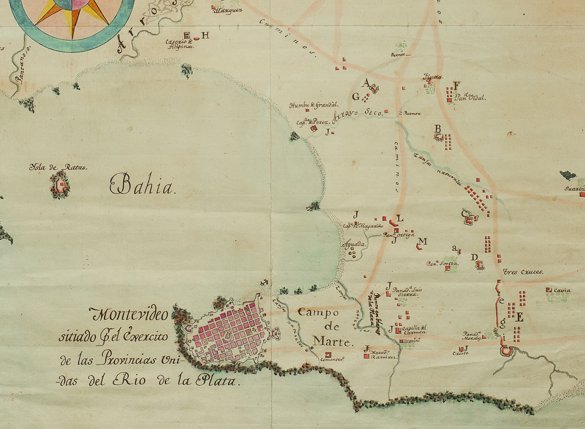 Detalle del plano del sitio de Montevideo por el ejército de las Provincias unidas del Río de la Plata. Levantado en 1813 por el ciudadano Bartolomé de Muñoz